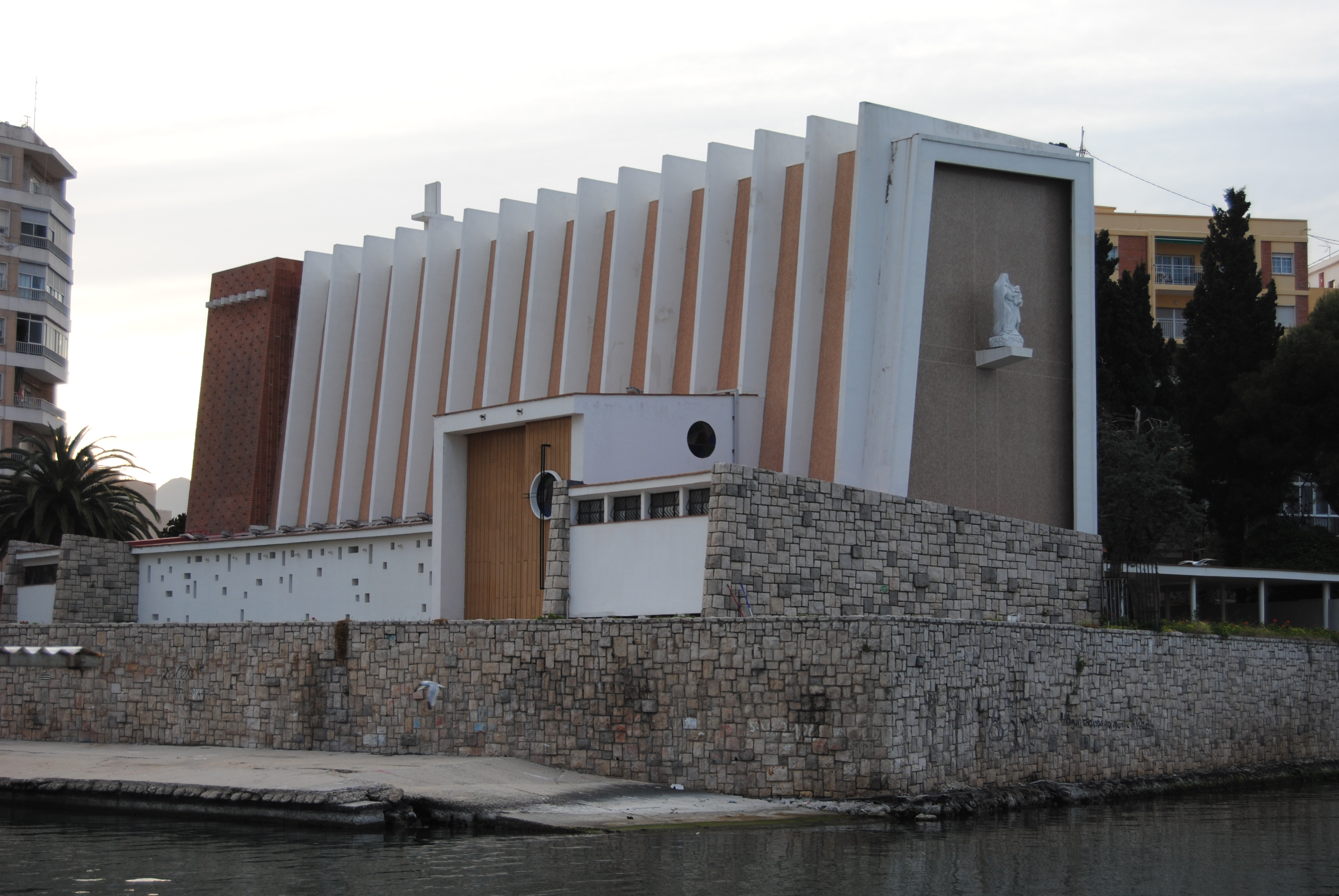 Iglesia de San Nicolas, Grau de Gandia